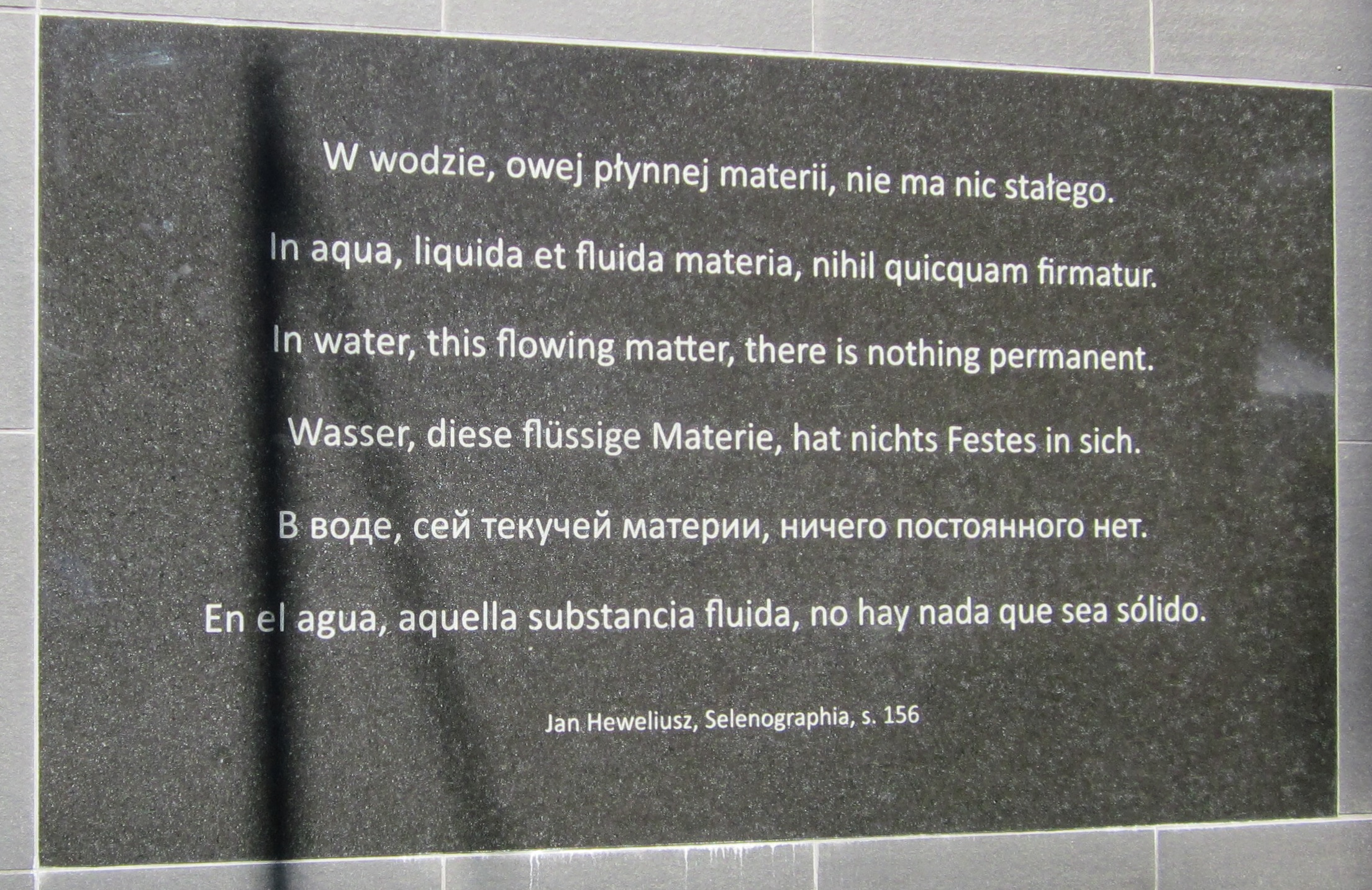 Der 2014 in Betrieb genommene Heweliuszbrunnen vor der Großen Mühle lockt mit unterschiedlichen Wasserspielen. Auf der hier abgebildeten Rückseite der Wasserwand steht in verschiedenen Sprachen ein Zitat aus Jan Hewelius' Werk Selenographia. Es lautet: "Wasser, diese flüssige Materie, hat nichts Festes in sich."